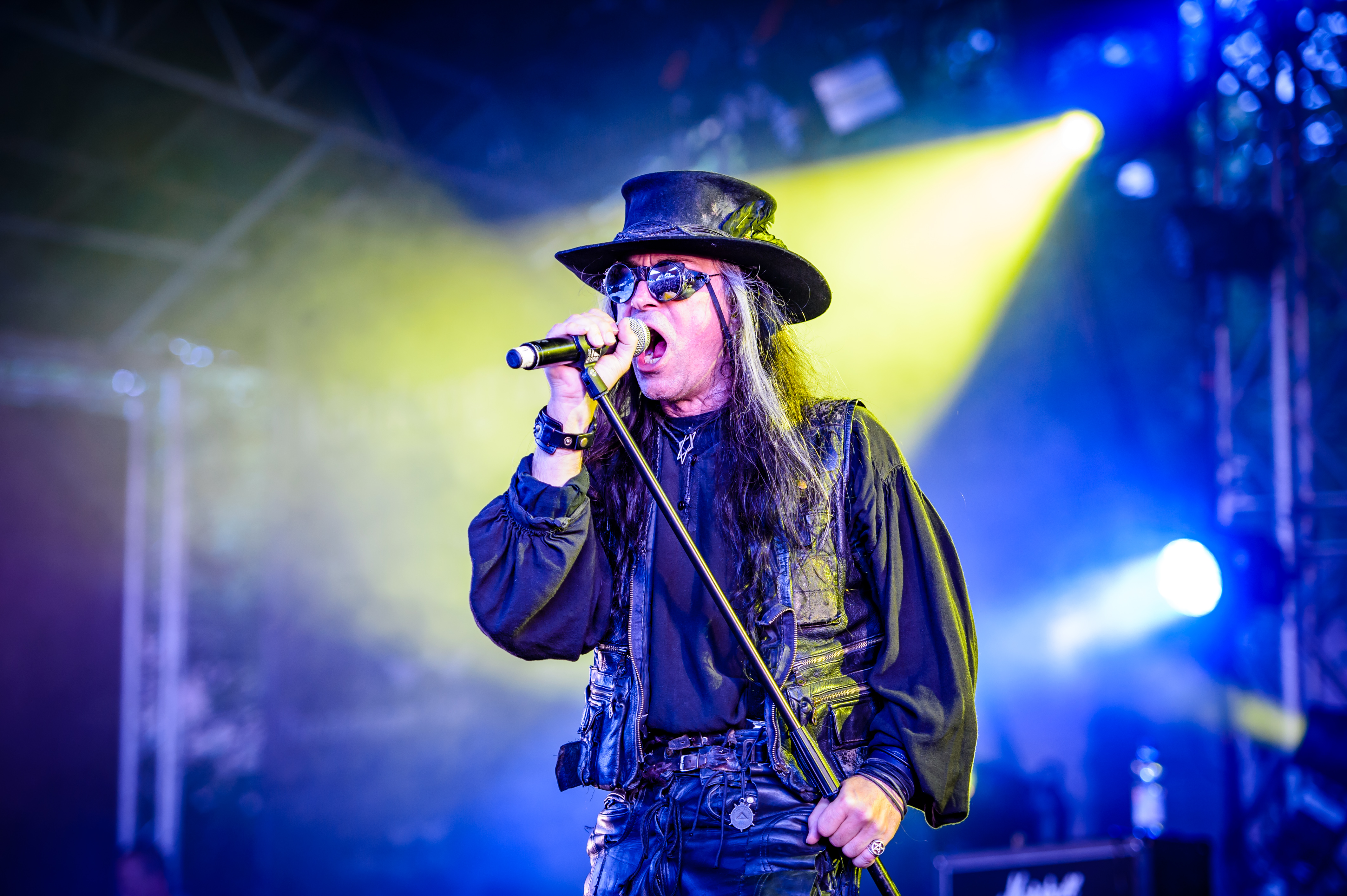 'Amphi Festival 2017; Tanzbrunnen Köln': 'Fields of the Nephilim'